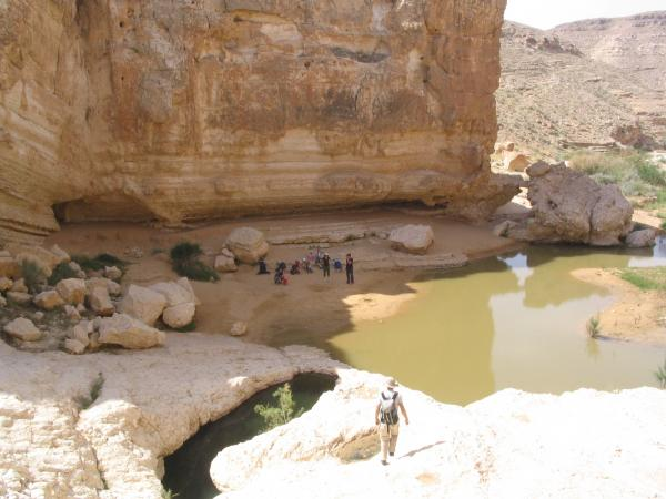 נחל ימין במכתש הגדול בנגב